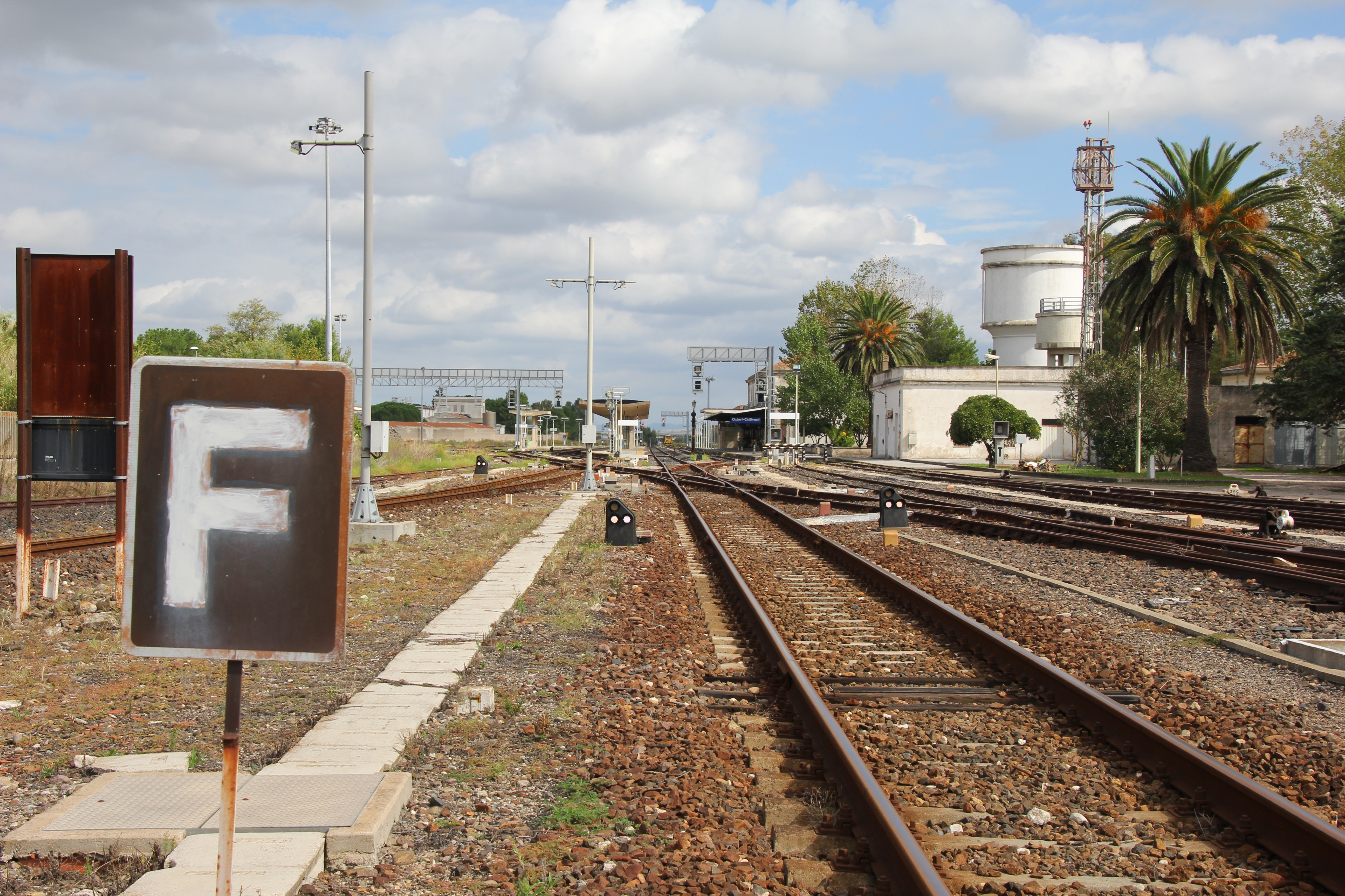 Ozieri - Stazione ferroviaria di Chilivani